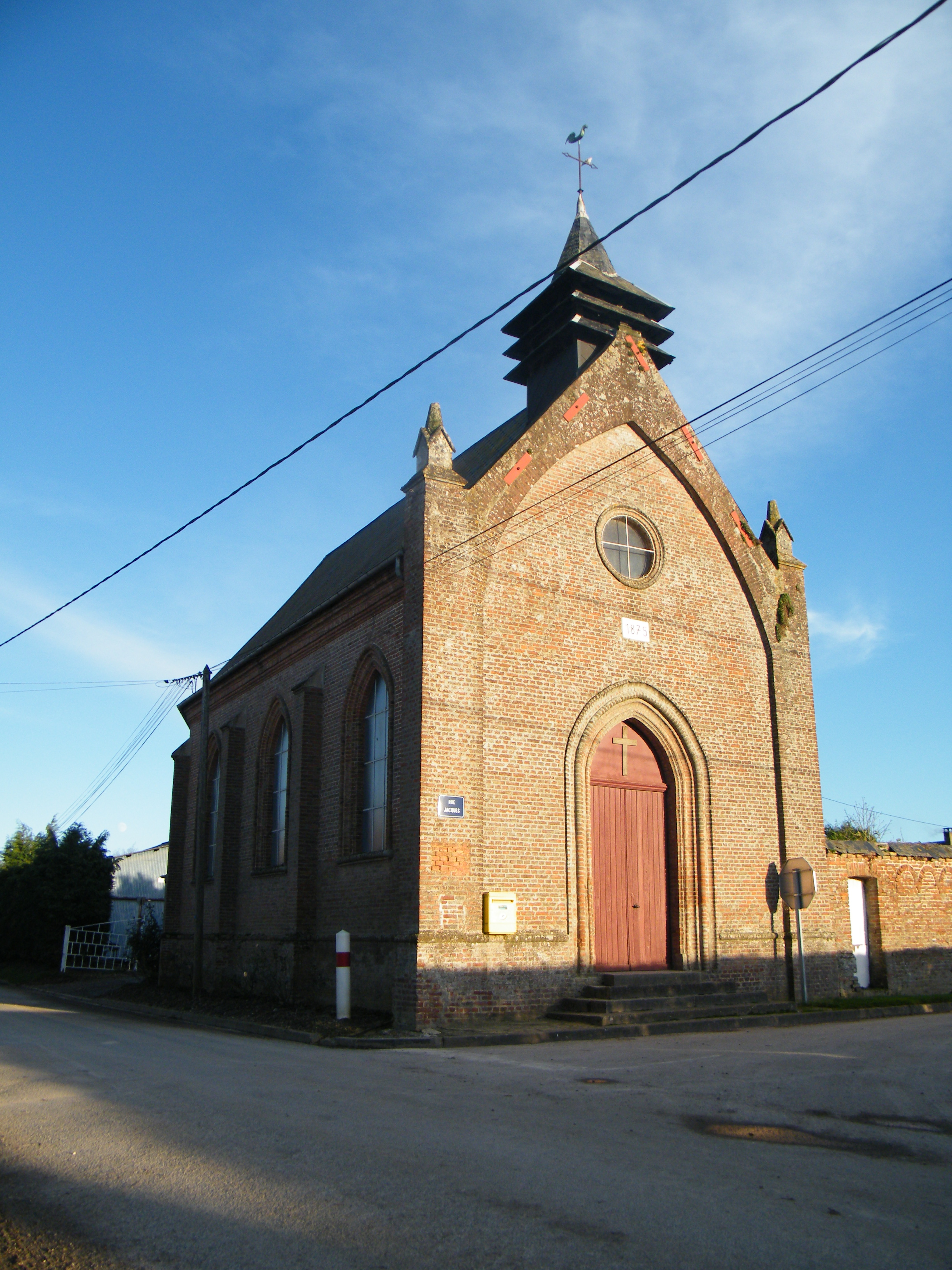 Le Fay, hameau de Vergies, chapelle